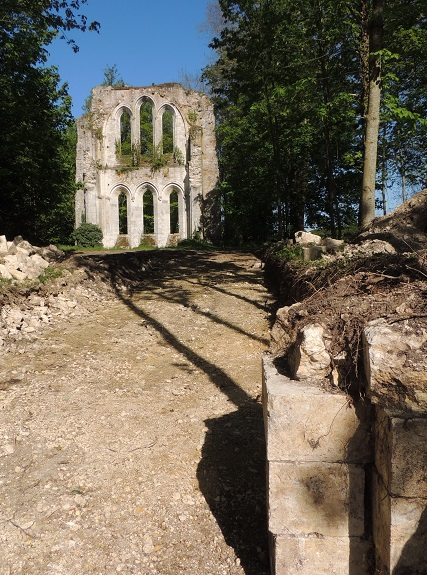 Abbaye de Jouy, mur du chevet de l'église au second plan percé de 6 hautes baies à voutes gothiques réparties sur 2 étages, arbres de part et d'autre et ruines de mur à gauche et grosses pierres de taille régulières au premier plan à droite